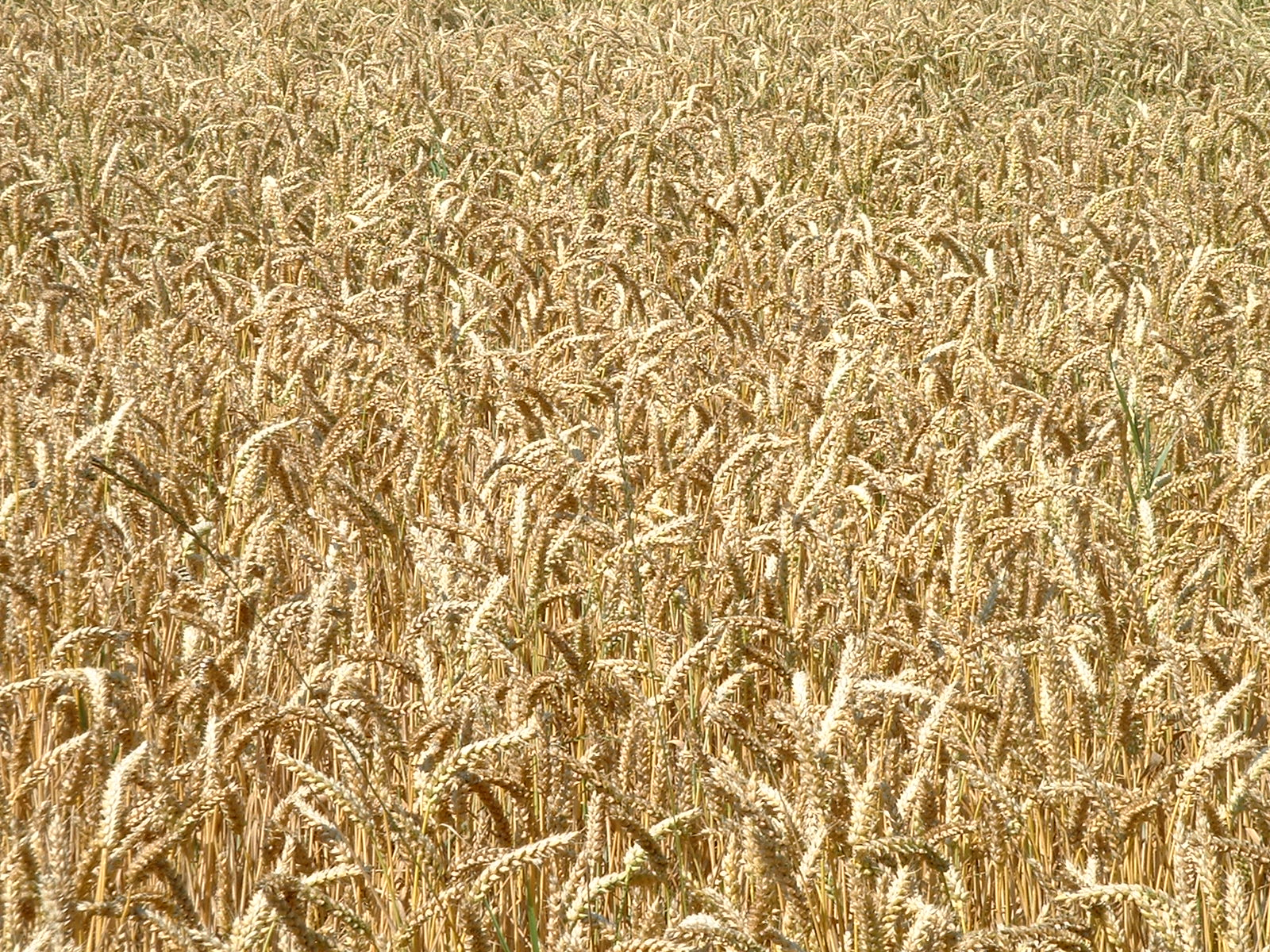 Ein Weizenfeld